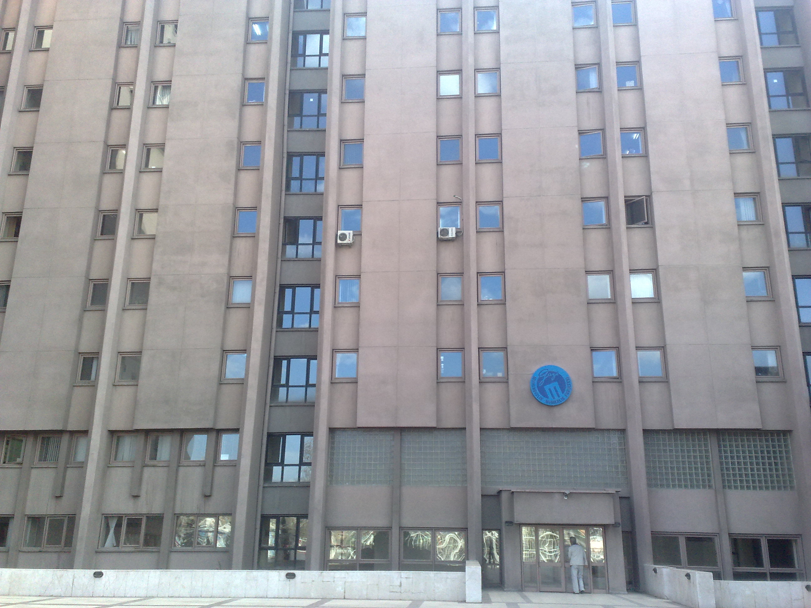 Gazi Üniversitesi'nden bir görüntü.